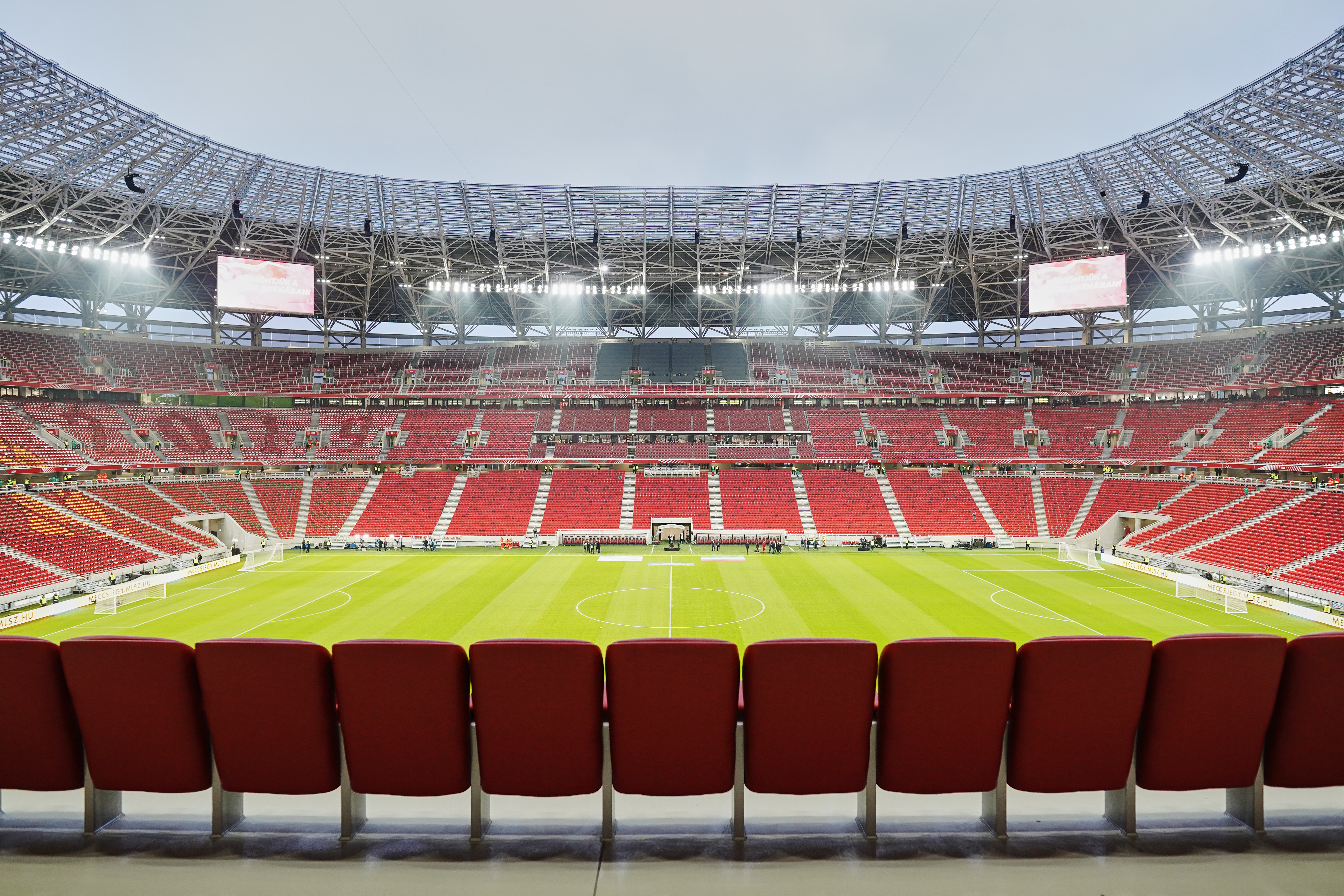 A Puskás Aréna megnyitásakor